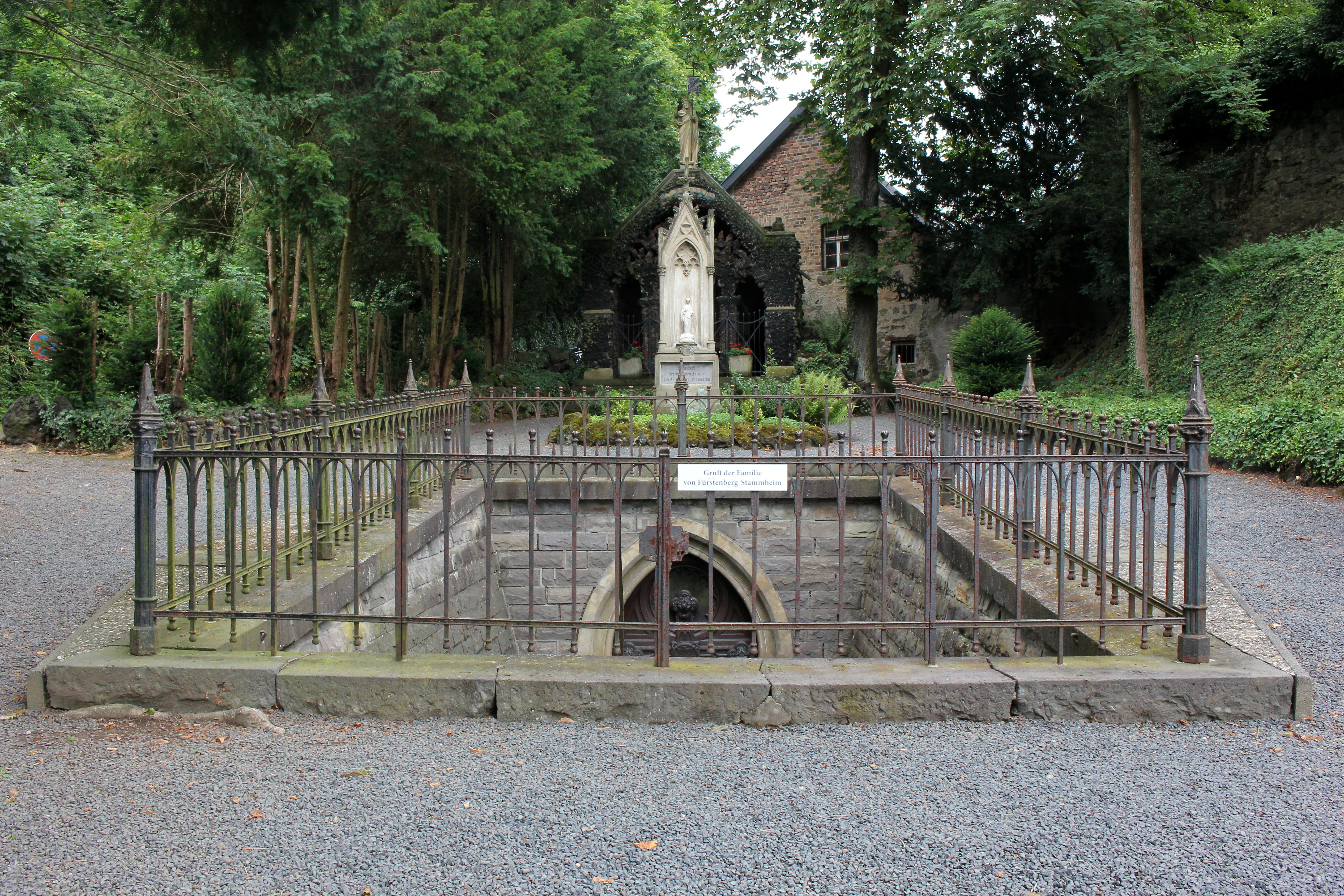 Gruft der Familie von Fürstenberg-Stammheim an der Apollinariskirche in Remagen. Franz Egon Freiherr von Fürstenberg-Stammheim ließ diese Kirche in den Jahren 1839 bis 1857 anstelle einer baufällig gewordenen errichten.